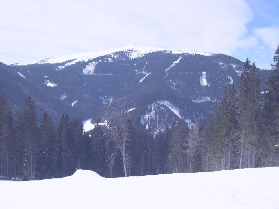 Fotografie von (c)Johannes Hartl 2005 (Blick vom Eichberg)